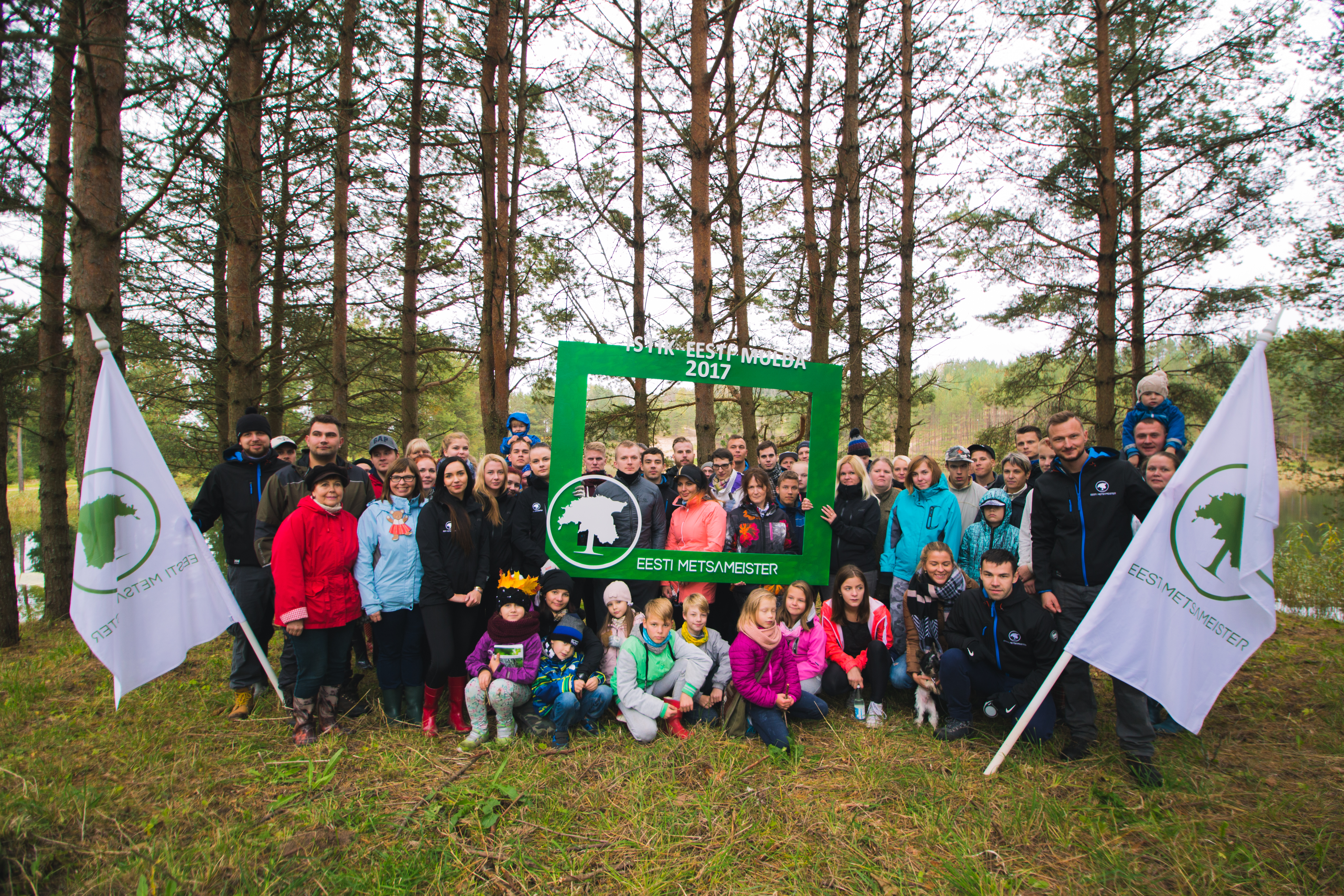 Heategevus üritus Lähtel, Tartu vallas.